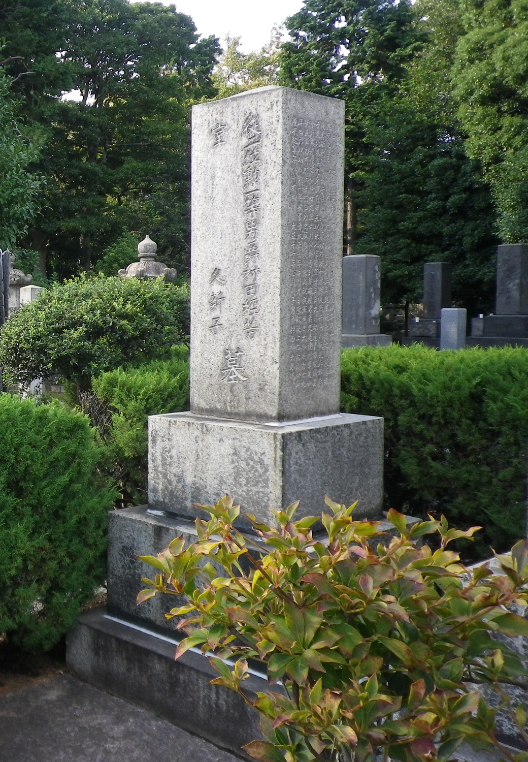 村田経芳の墓